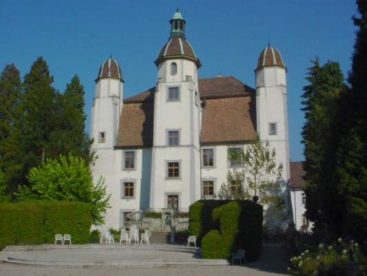 Bad Säckingen: Schloss Schönau